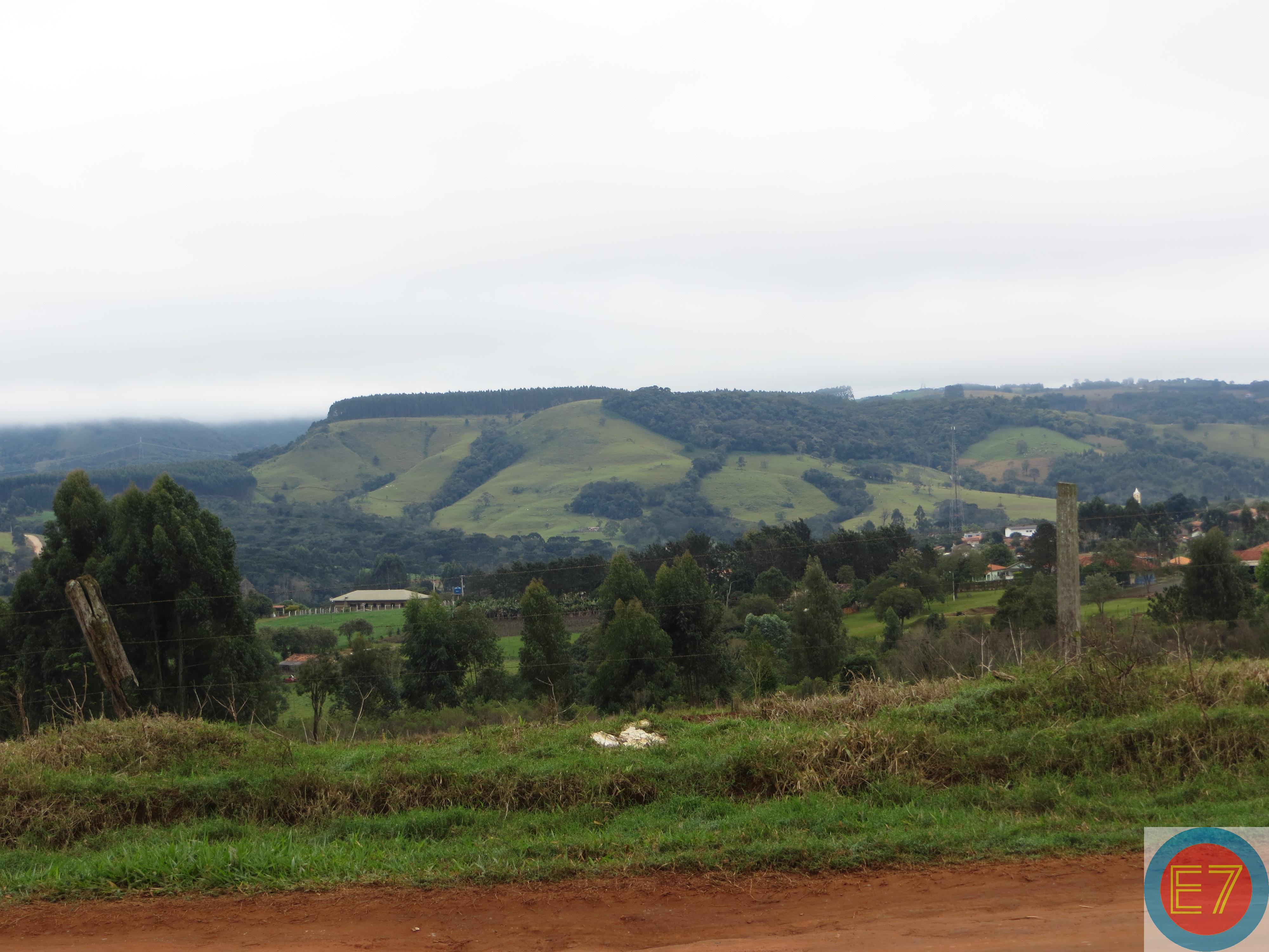 Serra do Caeté, ponto mais alto do município de Curiúva, Estado do Paraná, Brasil.